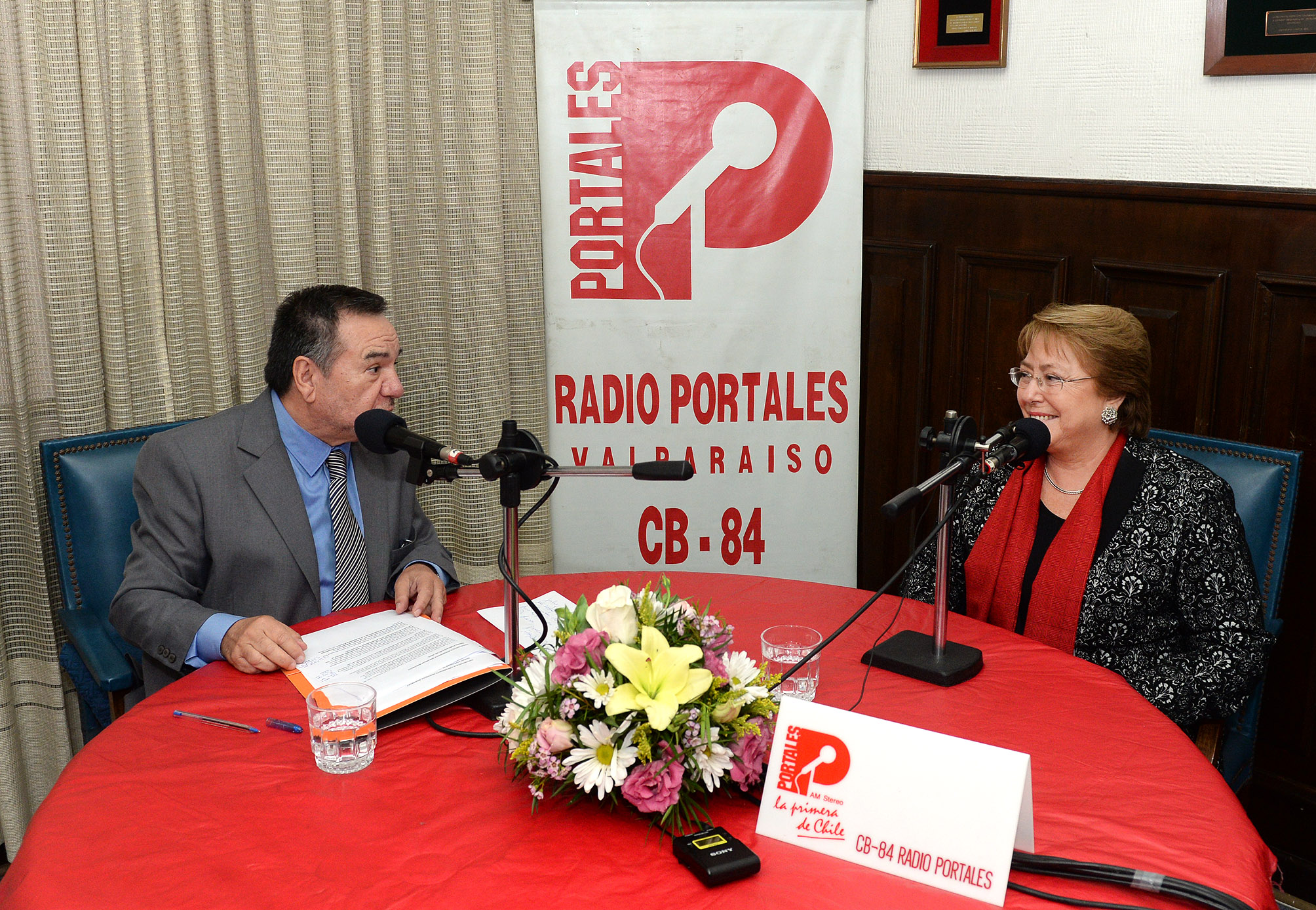 Gobierno de Chile